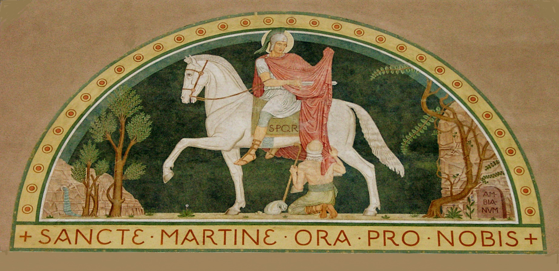 St. Martin, Bemalung des Westgiebels der Kirche der Erzabtei St. Martin zu Beuron, 1899/1900. Painters: ?; Jan Willibrord Verkade († 1946) Photograph: selbst fotografiert am 9. OCT 2004 in Beuron, Germany